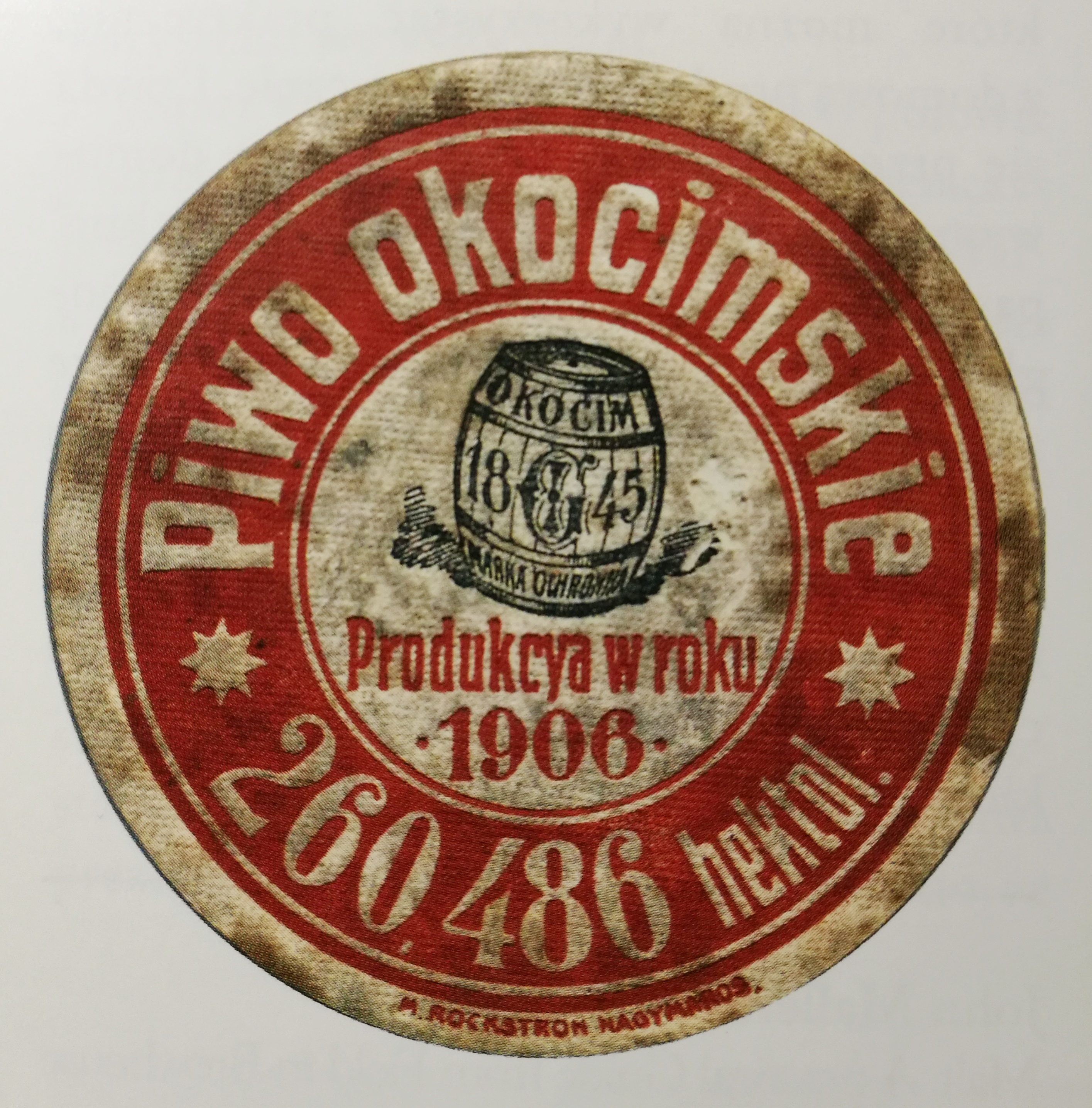 Podstawka pod piwo, jedna z najstarszych z Polski